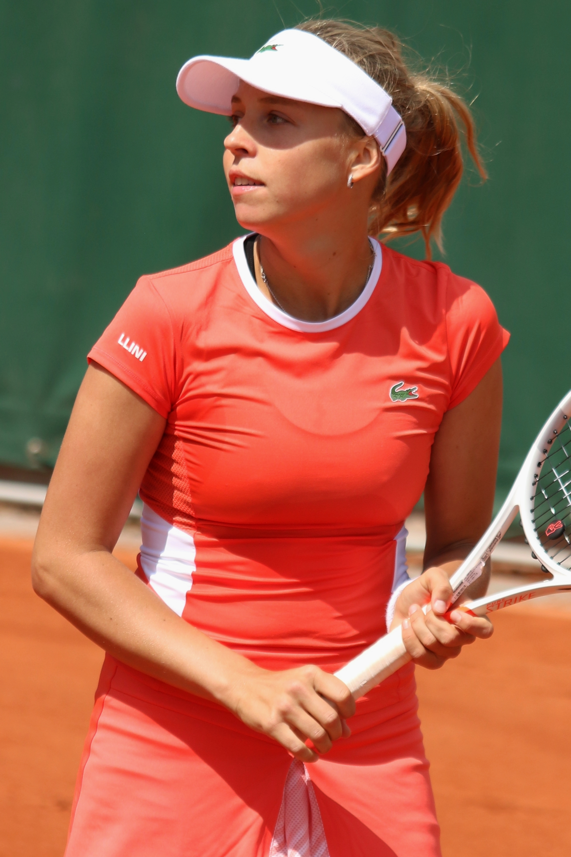 Kontaveit RG19 (29)